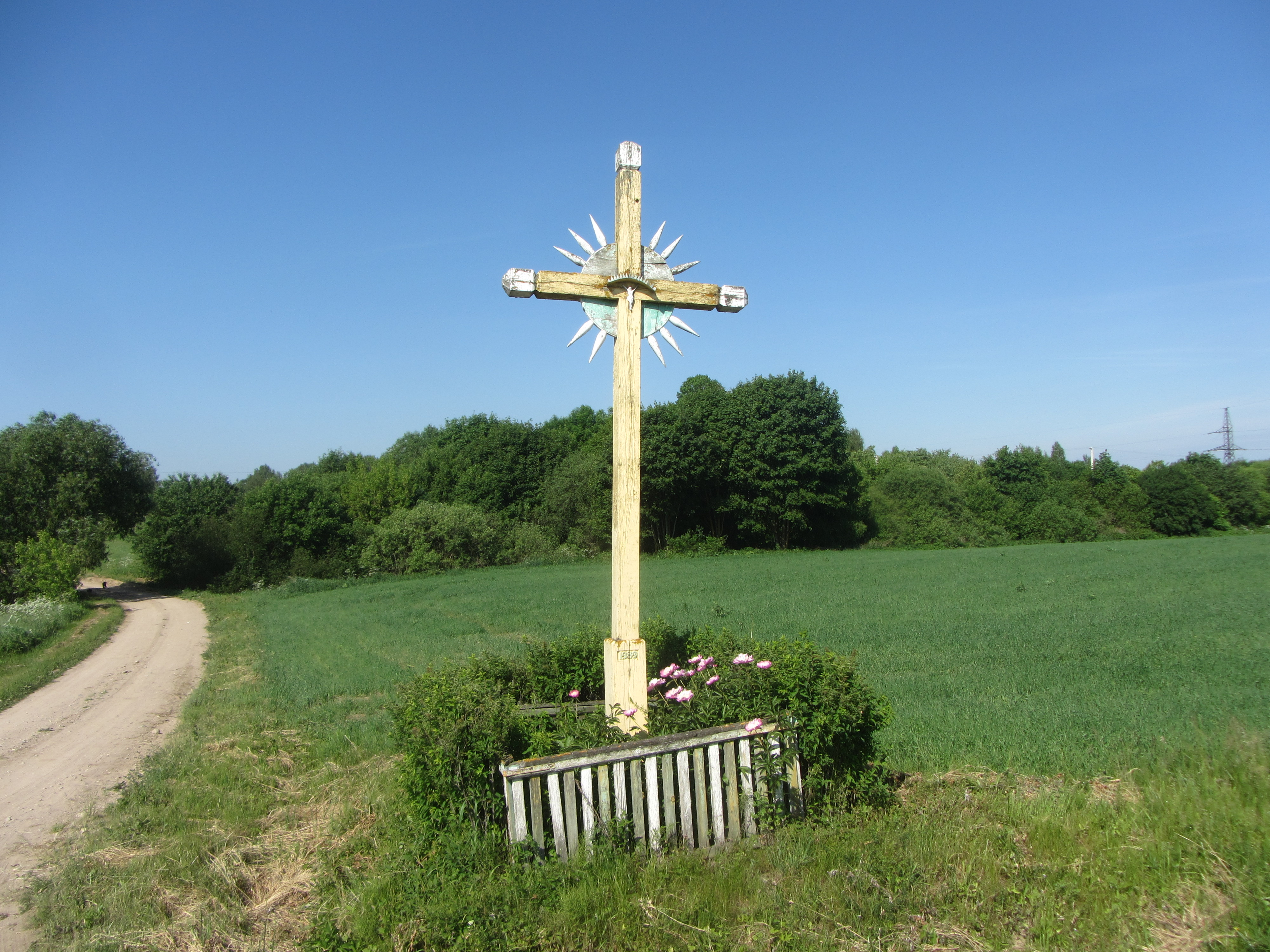 Žiežmarių apylinkės sen., Lithuania